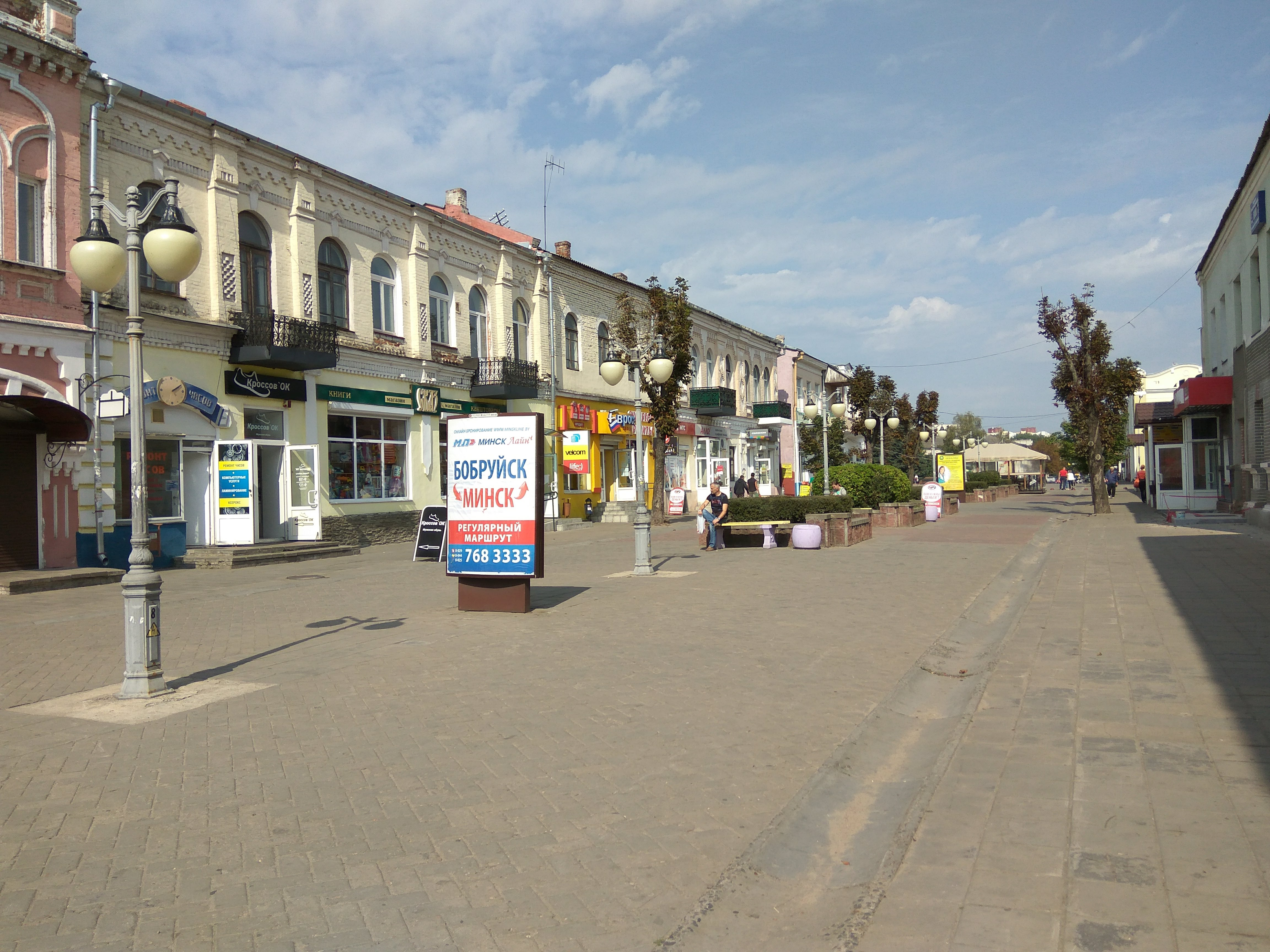 Бабруйск. Вуліца Сацыялістычная